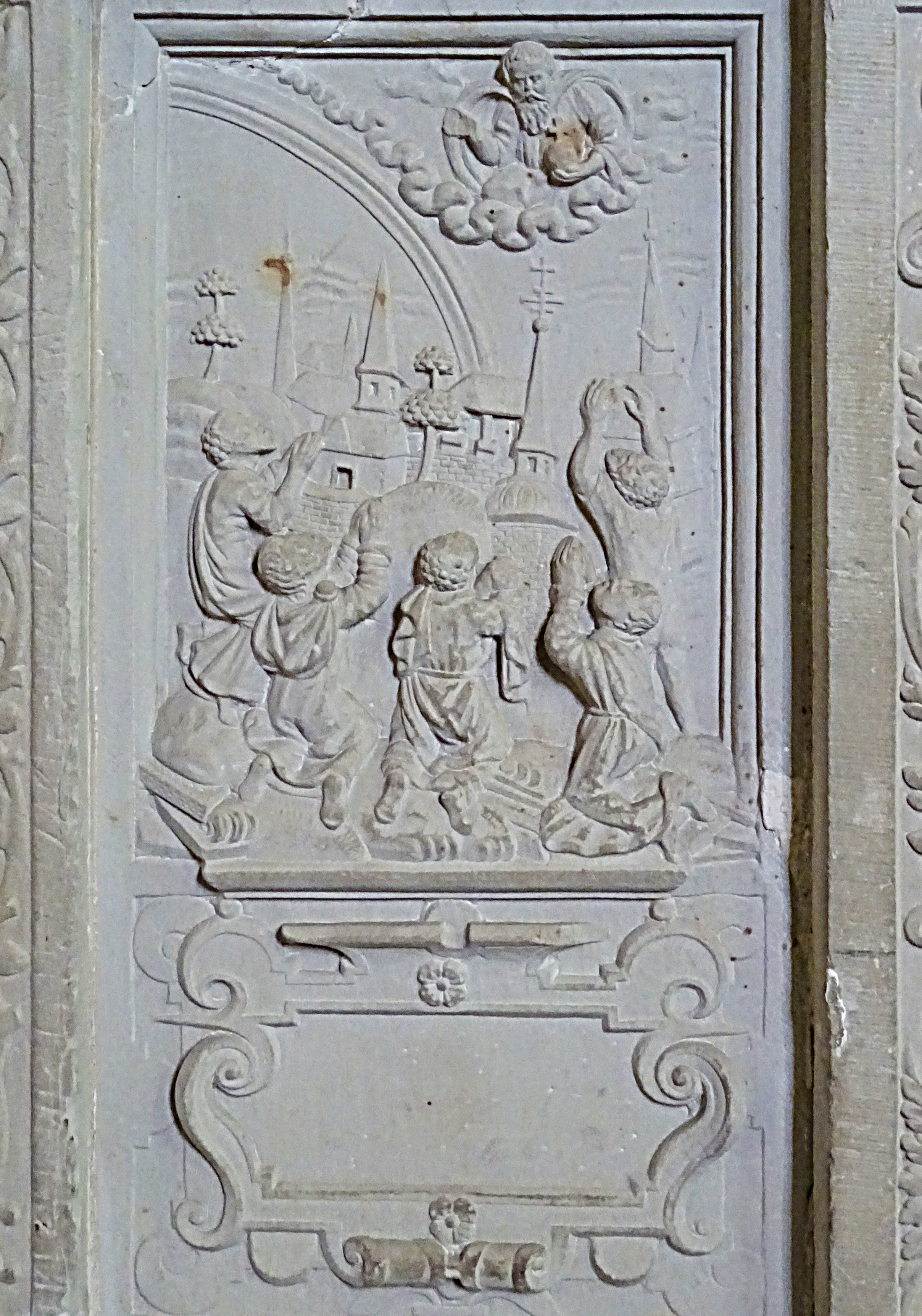 Steinbilderbibel in der St. Annenkirche (Eisleben), 07/29, Gott schließt mit Noach einen Bund nach der Flut, sein Zeichen ist der Regenbogen